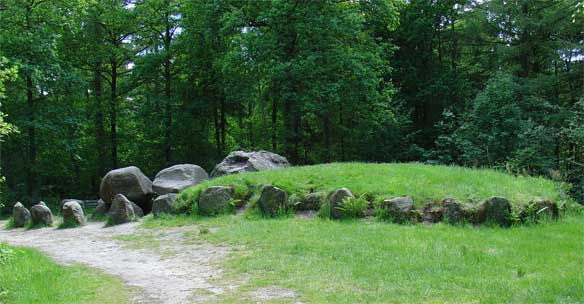 Hunebed de Papelozekerk (D49) bij Schoonoord (totaalbeeld) Categorie:Afbeelding Drenthe